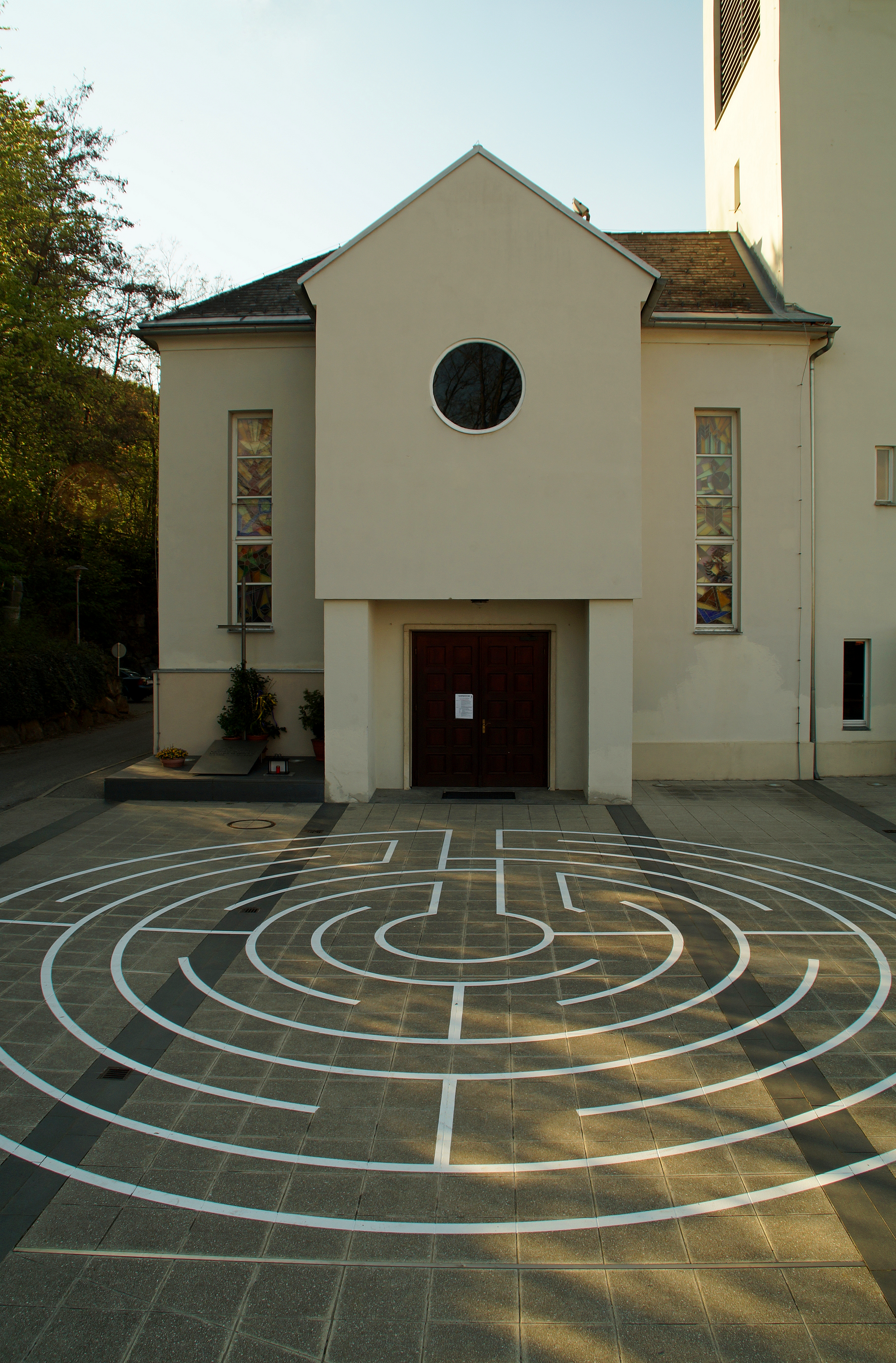 Pfarrkirche St. Anna in Gösting, Graz, Steiermark - das im April 2019 neu angelegte Labyrinth am Vorplatz